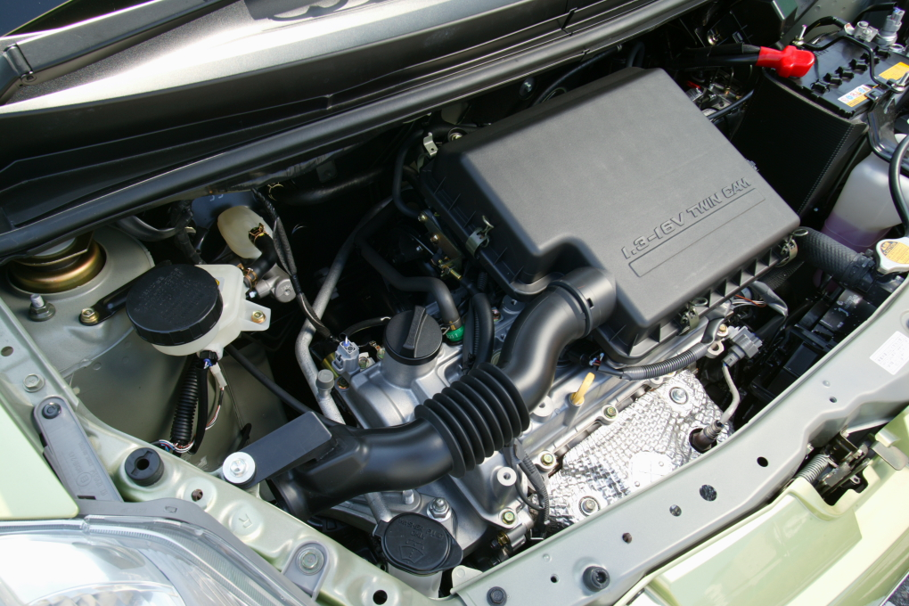 Daihatsu K3-VE engine